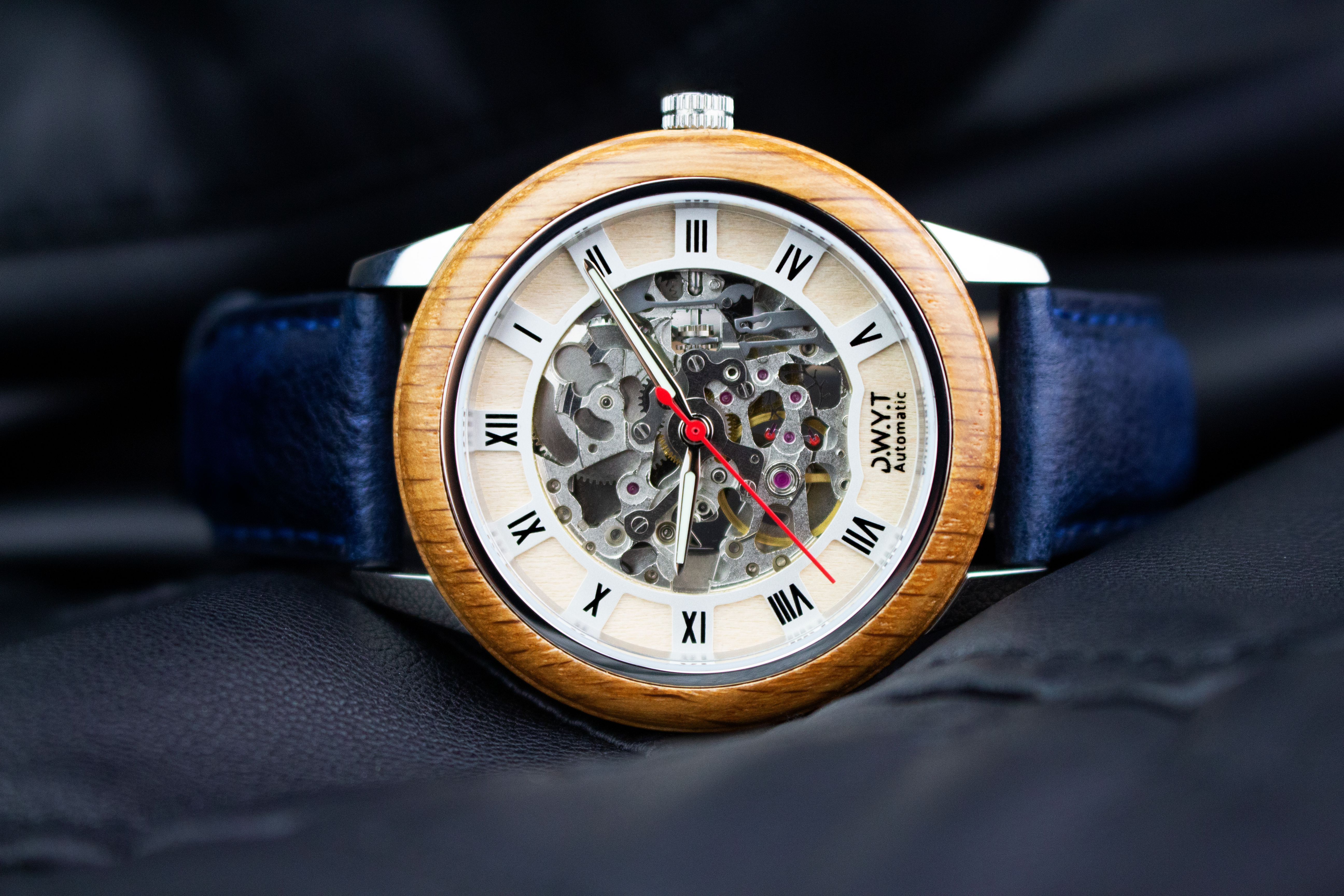 Montre automatique Constantin de la marque française DWYT Watch